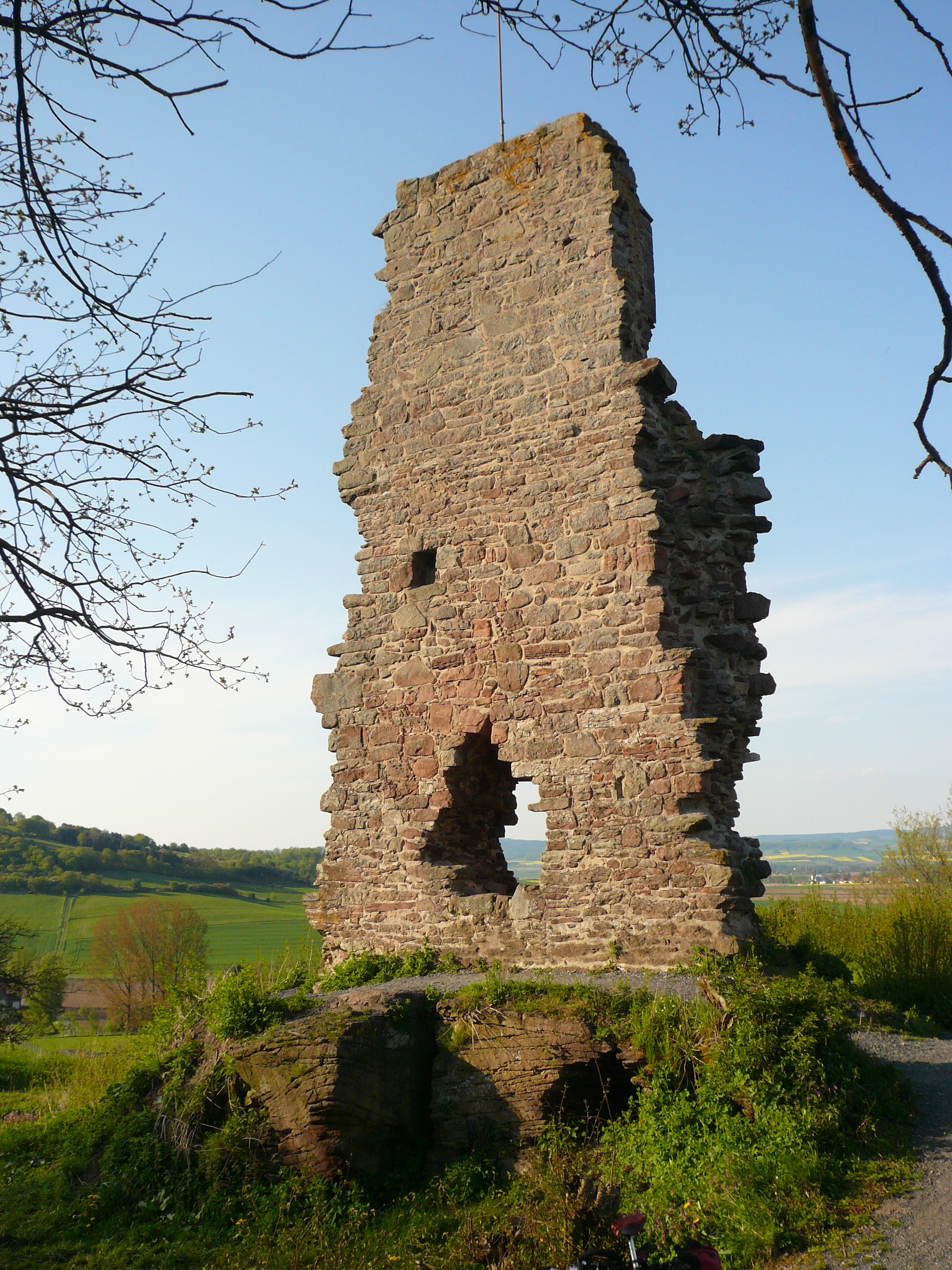 Mauerrest auf der Ruine der Löwenburg bei Lauenberg, Stadt Dassel, Landkreis Northeim. Erbaut angeblich als Jagdschloss der Grafen von Dassel und ab 1250 welfisch, 1399–1530 Verwaltungssitz des Amtes Lauenberg im Herzogtum Braunschweig-Lüneburg (Beleg: Informationstafel an der Ruine)